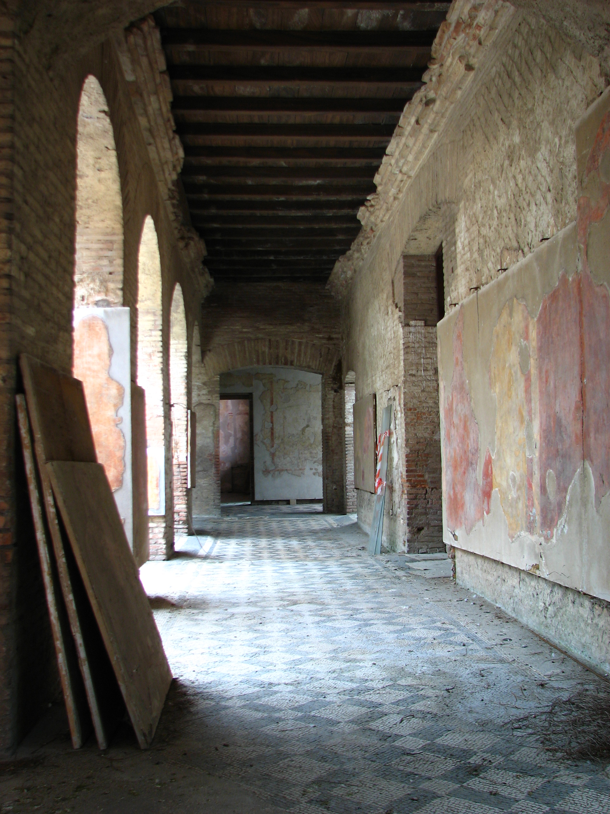 Ostia Antica, Roma, ItaliaIMG_1376 Ostia Antica